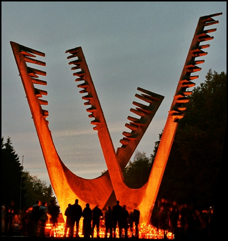 Pomnik Braterstwa Broni na Cmentarzu Centralnym w Szczecinie. Projekt: Sławomir Lewiński, współpraca: inż. K. Baromski, inż. Kazimierz Szulc, majster St. Cudecki; odsłonięty 28 października 1967 (wg Cmentarz Centralny w Szczecinie. Ogromny park pochował umarłych..., red. Słomiński, Maciej, Wyd. "Kadruk", Szczecin 2005, ISBN 83-89341-27-1, s. 122-124)